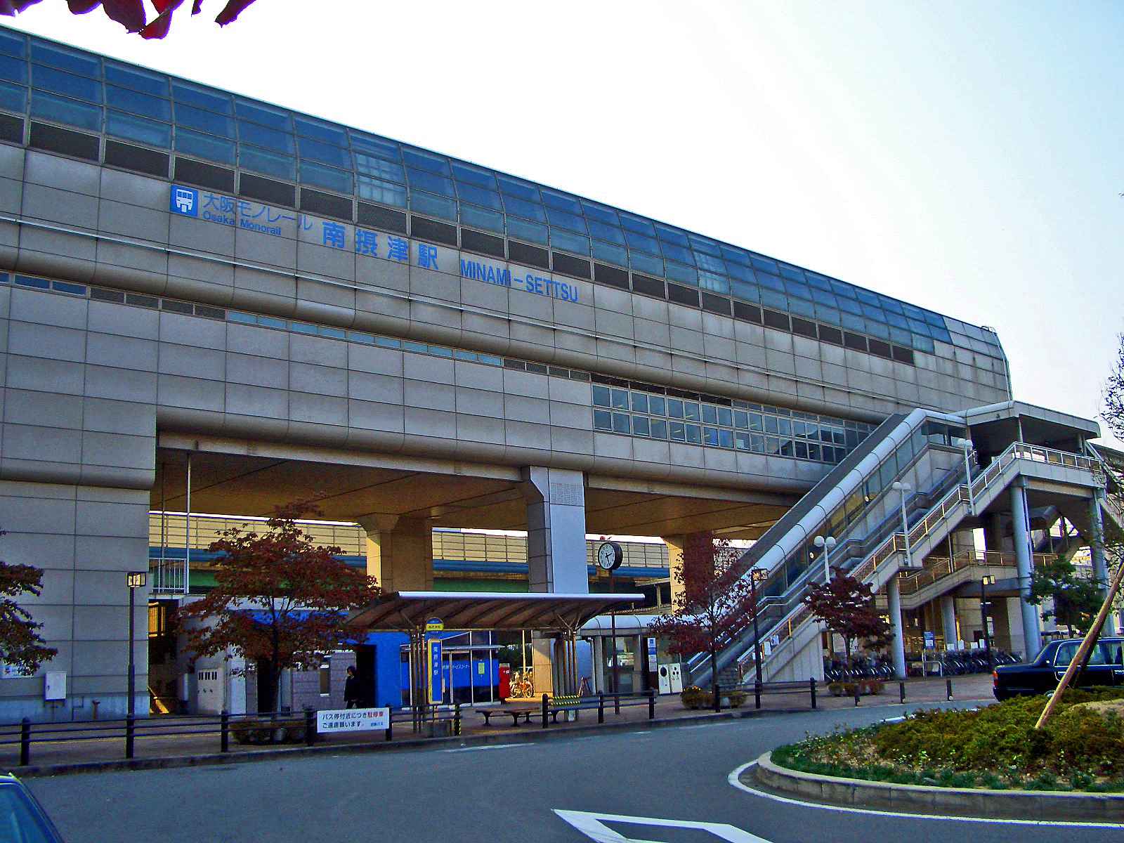 Minami-Settsu_Station （Osaka monorail）in Osaka,Japan. 南摂津駅（大阪モノレール；大阪府摂津市）